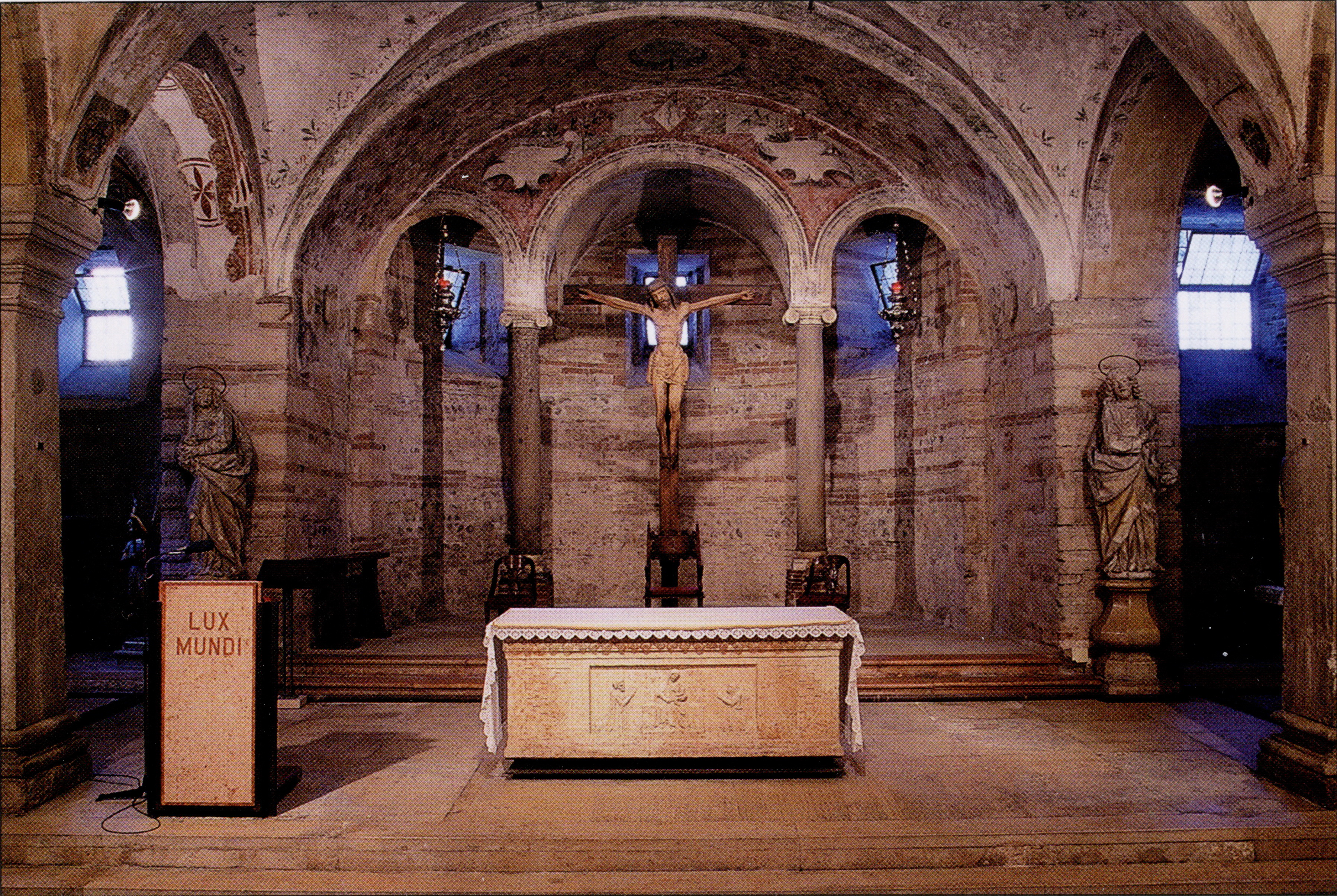 Verona - San Fermo Maggiore - Chiesa Inferiore - Altare